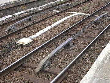 Twee krokodillen in het spoor te Liège-Guillemins, eigen foto